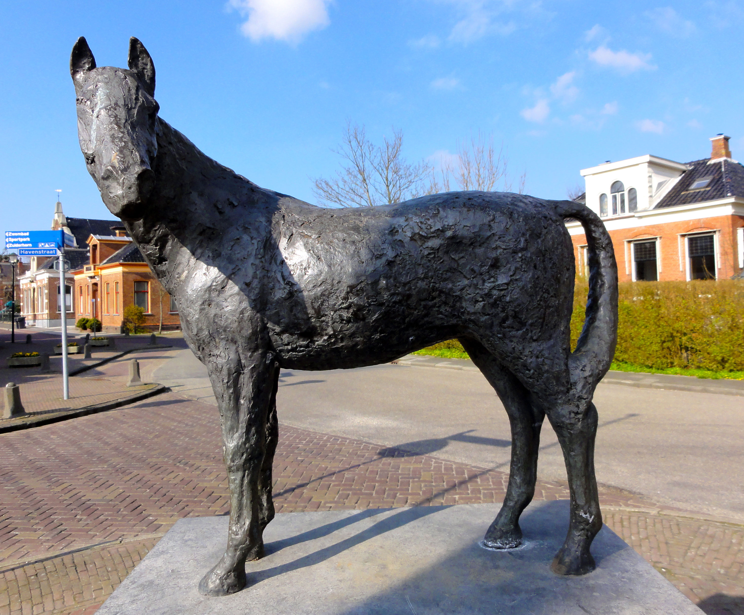 Paard door Folkert S. Reitsma, hoek Stationsweg/Havenstraat in Warffum